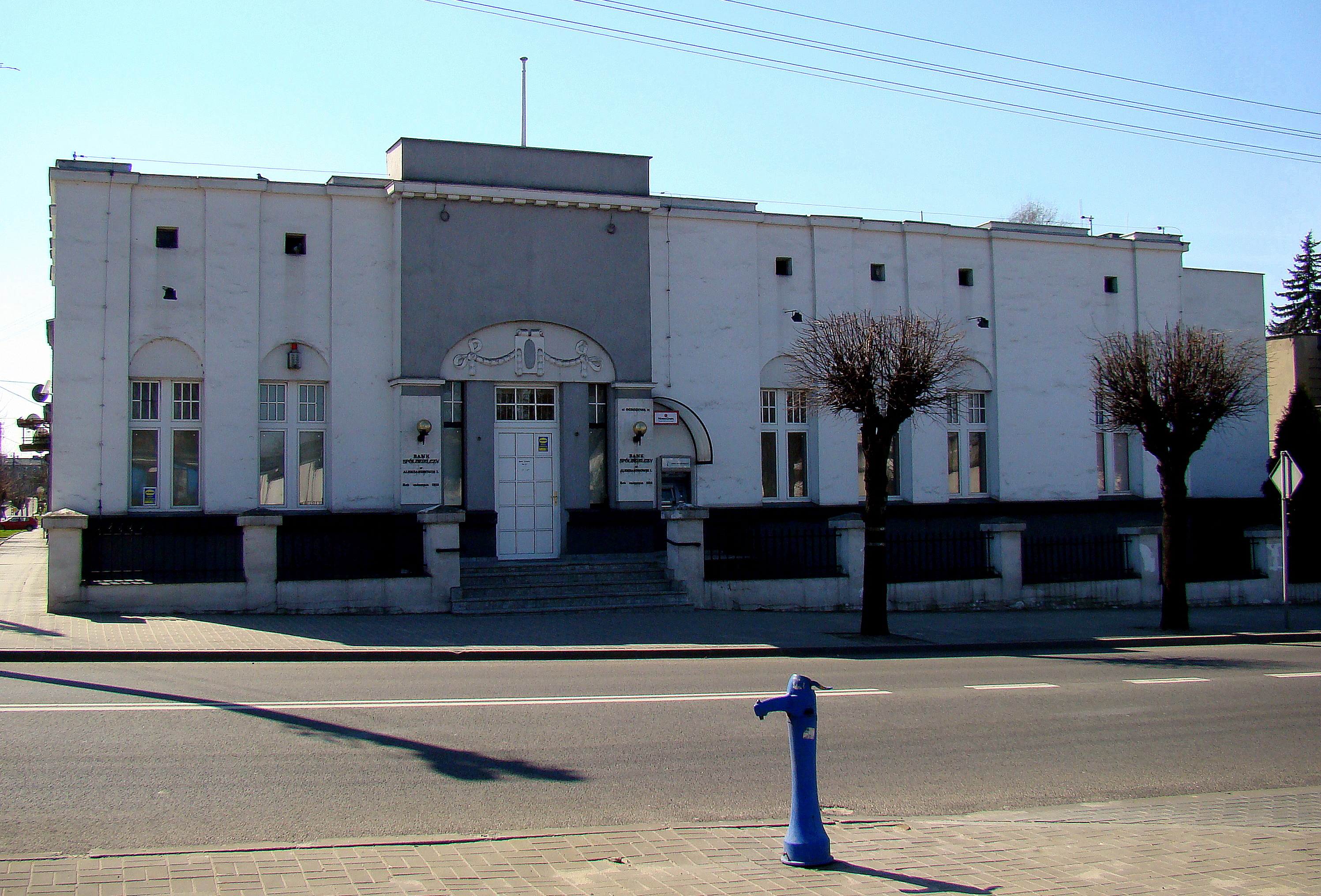 Budynek daw. Kasy Chorych w Aleksandrowie Łódzkim, obecnie Bank Spółdzielczy, ul. Ogrodowa 14 (powiat zgierski, województwo łódzkie), Polska